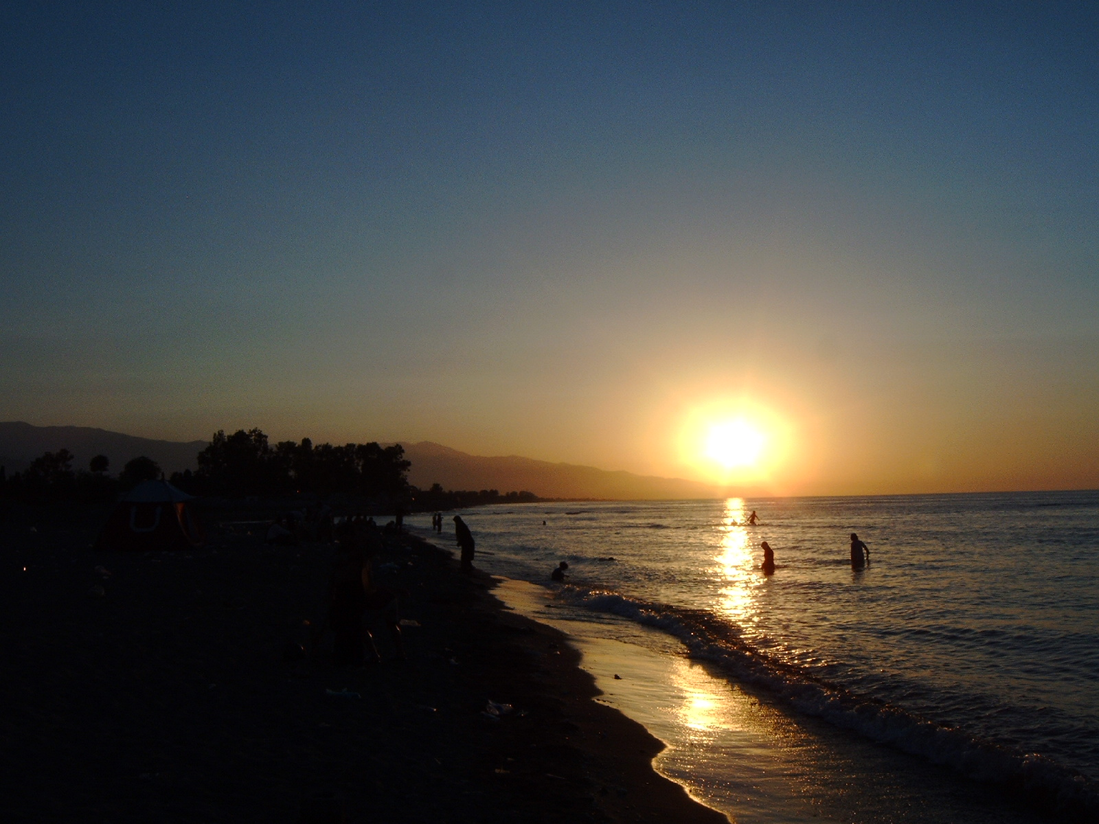 Sonnenuntergang am kaspischen Meer in Iran